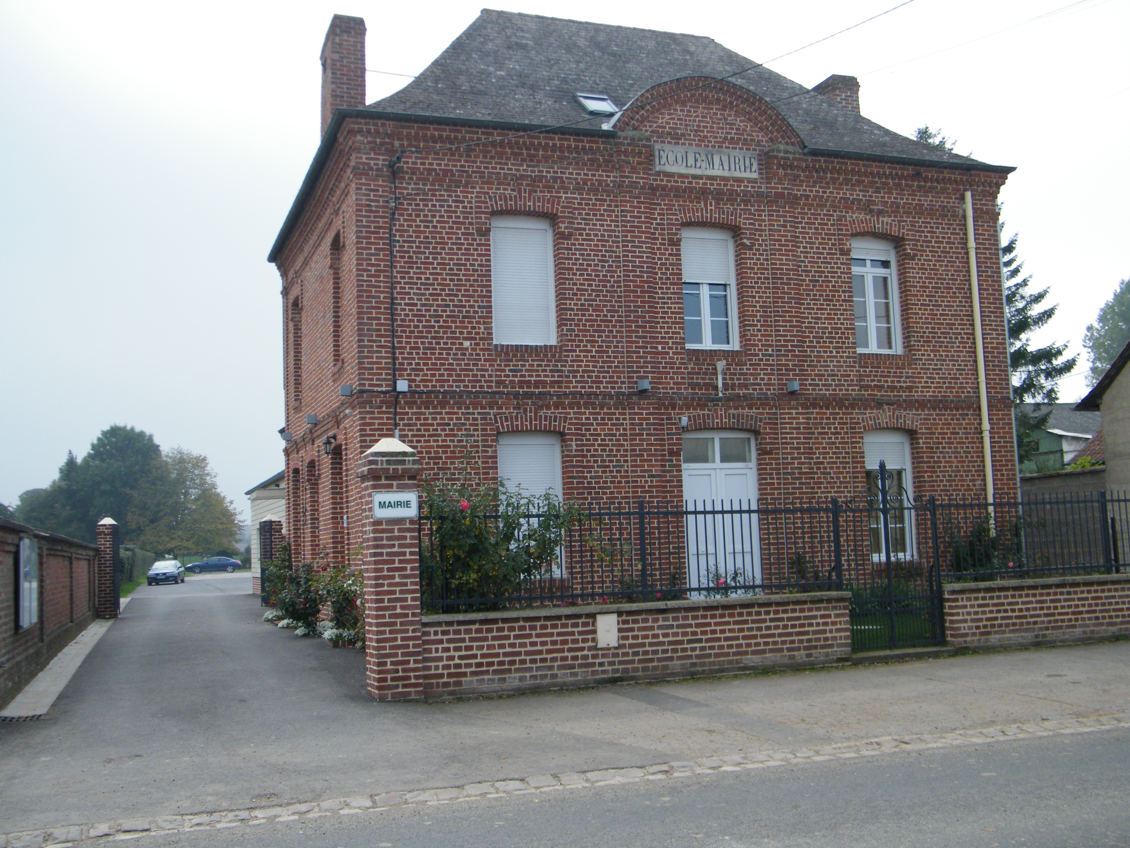 Mairie de Maizicourt, Somme, Fr